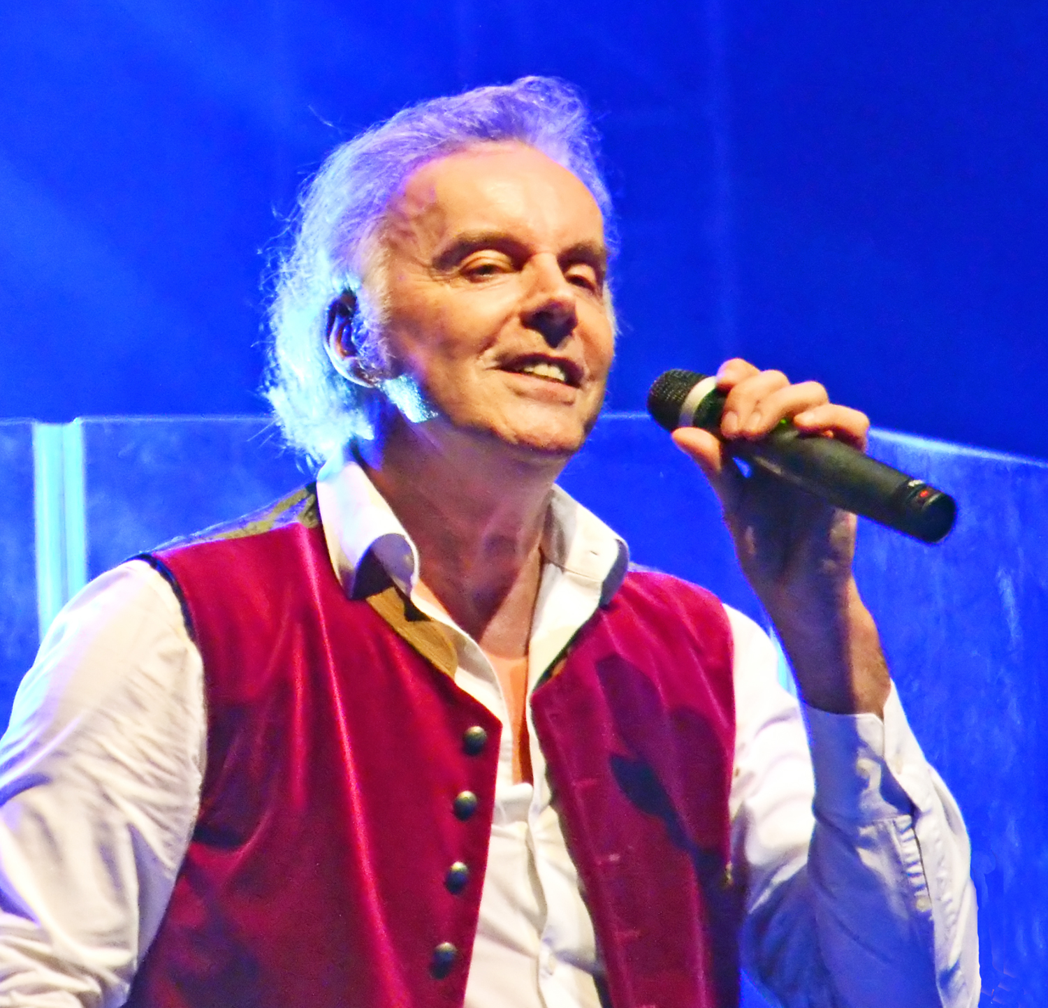 Alfred Jaklitsch von den Seern- Foto von Alfred Pertl